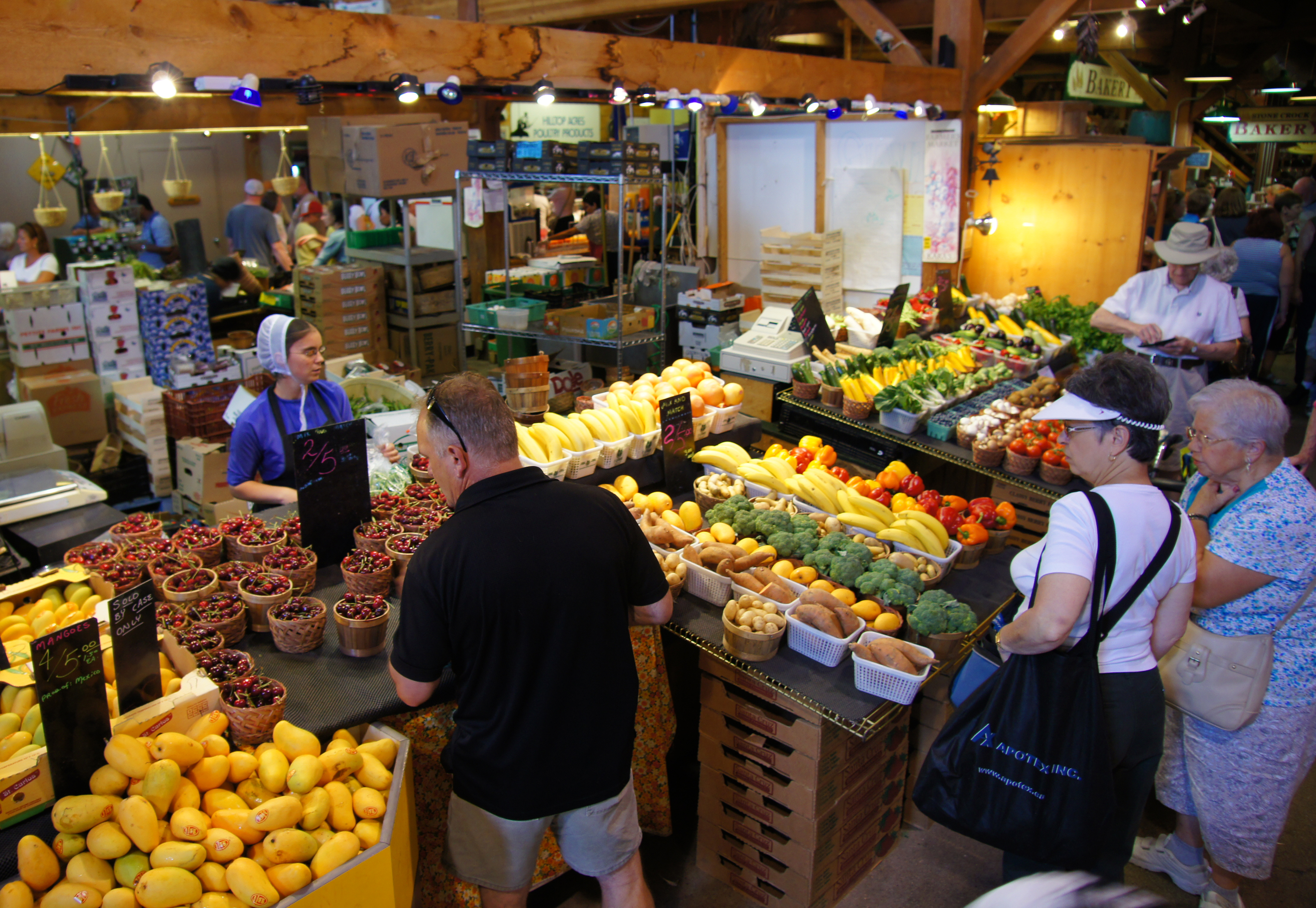 2011-07-06 07-08 Kanada, Ontario 024 St. Jacobs, Farmers Market.jpg